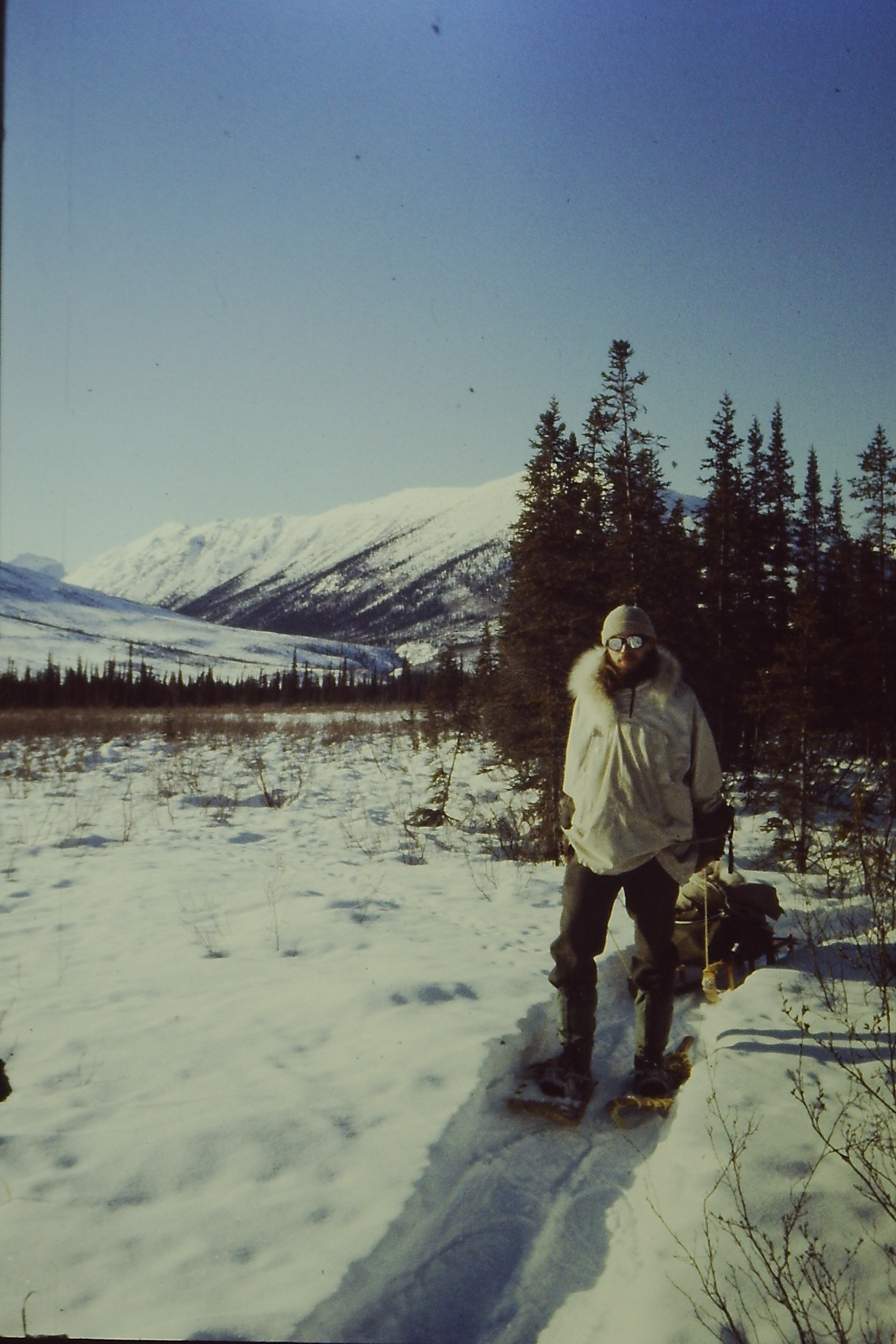 See title